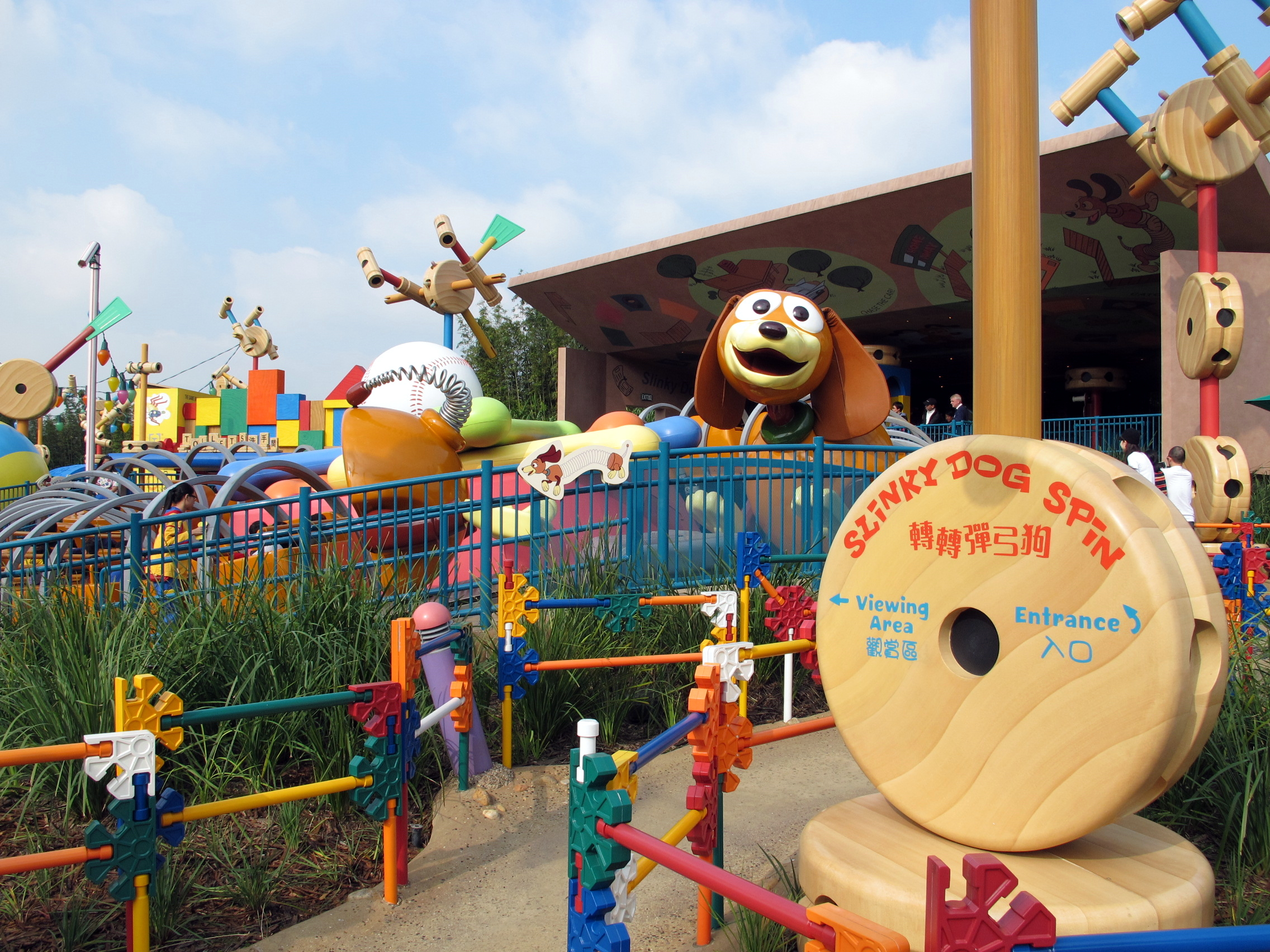 HKDL Toy Storyland Slinky Dog Spin